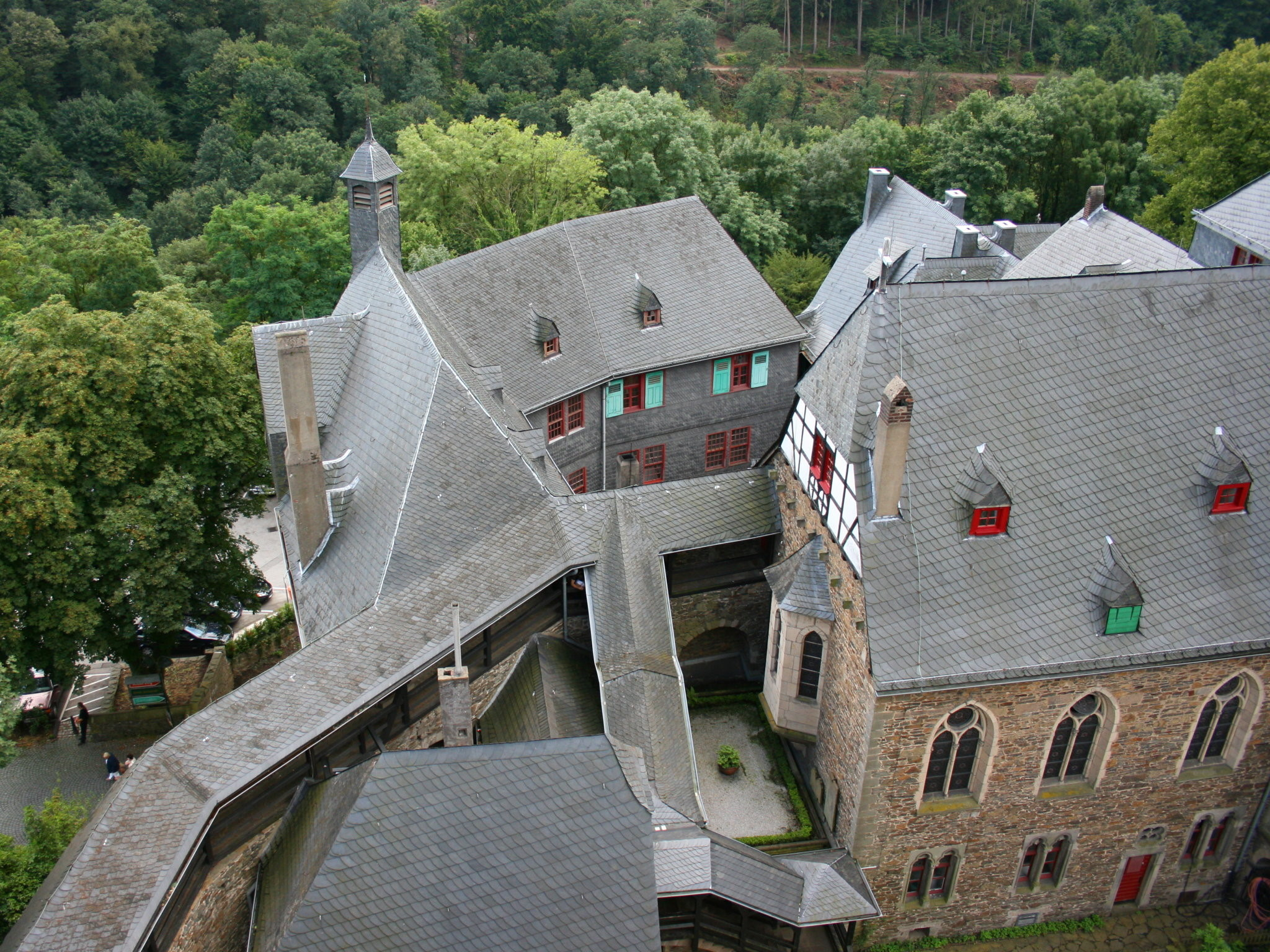 Blick vom Bergfried auf Schloss Burg in Solingen-Burg. Auf der rechten Seite im Obergeschoss die Pankratiuskapelle mit dem Kapellenerker.